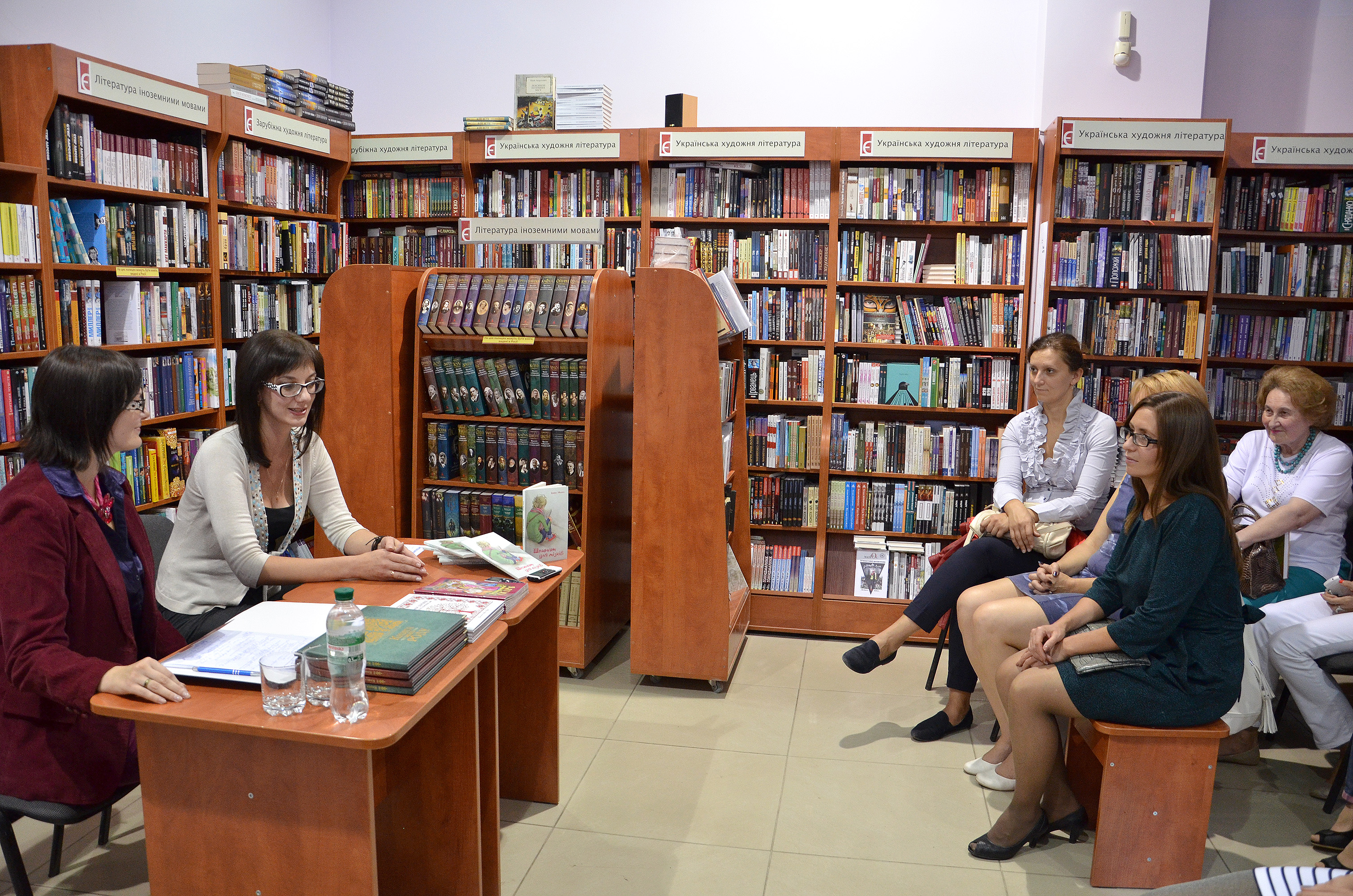 Презентація книжки новел і замальовок української письменниці Ірина Мацко «Шпинат для мізків» у «Книгарні “Є”» в Тернополі 17 вересня 2015 року. Презентацію проводить українська літературознавиця, поетка, журналістка, літературна критикиня Юлія Починок.